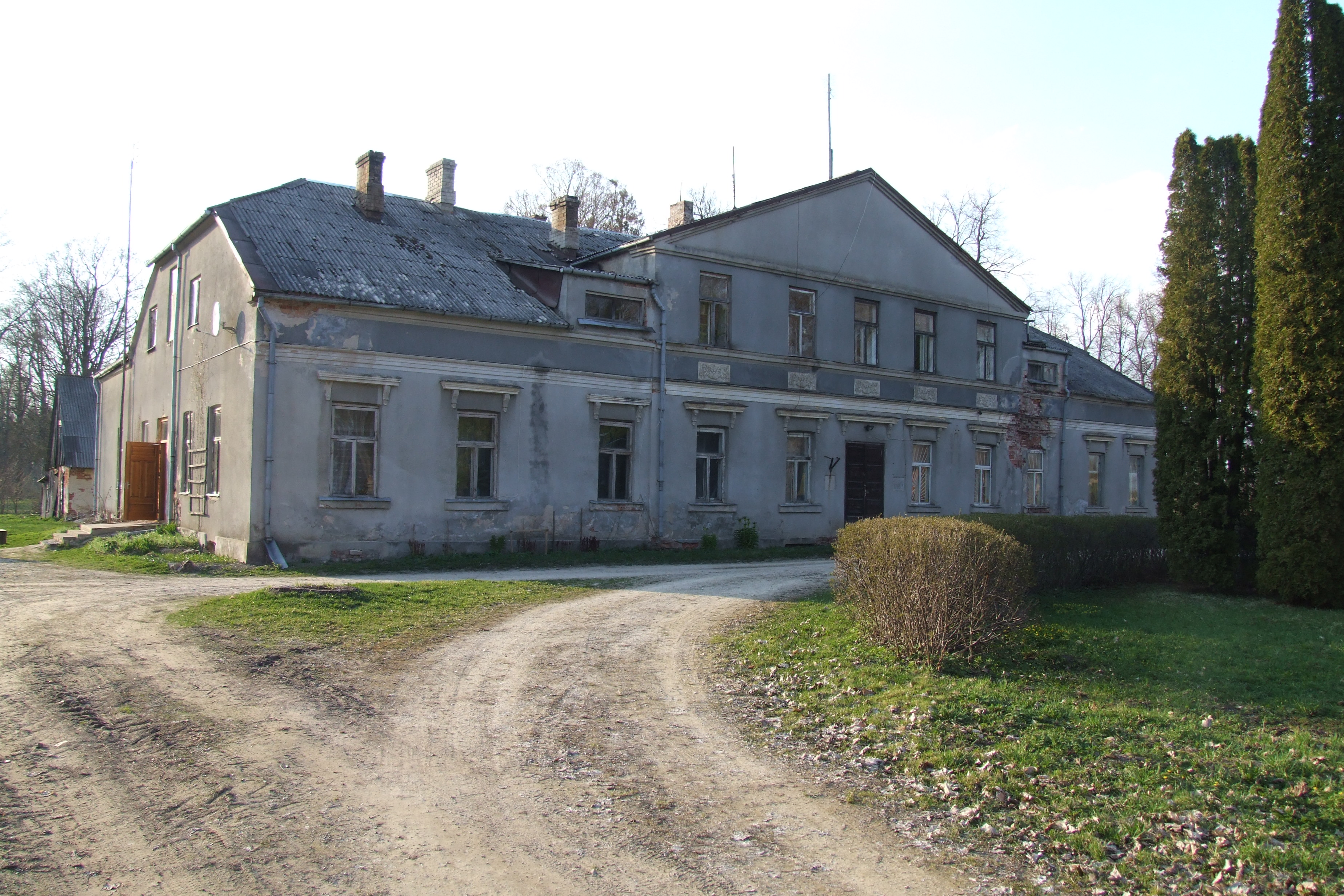 Ānes-Mēmeles muiža, 24.04.2011.